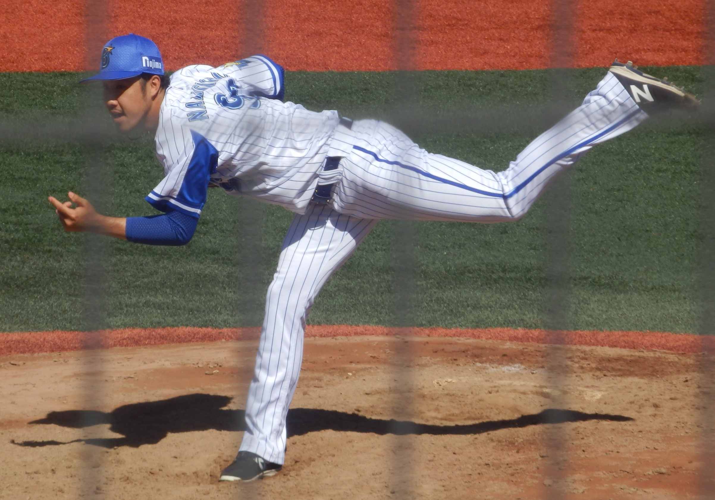 2019年6月16日 横須賀スタジアムにて